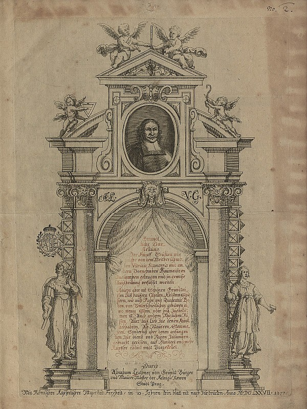 Original image description from the Deutsche FotothekArchitektur & Geometrie & Portal Title page of Abraham Leuthner’s 1677 architecture treatise Grundtliche Darstellung, Der Fünff Seüllen wie solche von dem Weitberühmbten Vitruvio Scamozzio und andern Vornehmben Baumeistren Zuesamben getragen und in gewiße Außtheillung verfasset worden …. Transcription of the complete title (| marks the beginning of a new line, || the beginning of a new paragraph): Grundt|liche Dar|stellung, | Der Fünff Seüllen wie | solche von dem Weitberühmb|ten Vitruvio Scamozzio und an|dern Vornehmben Baumeistren | Zuesamben getragen und in gewiße | Außtheillung verfasset worden, || Anjetzo aber mit Schönen Grundtri|ssen Lust haußern Capellen, Klöstern Schlo|ßern, wie auch Rohr- und Quadratur Bö|den, von unterschiedlichen gebäwen al|wo wenig Stein, oder holz, Zuebekö|men ist, Auch andern Nuzlichen Ri|ssen, Alles auß Lieb Zue denen Kunst|liebhabern, Alß Maurren, Steinme|zern, Sonderlich aber denen anfangen | den Zue dienst und Nuzen Zusamben | gebracht gerissen, auf Hundert und mehr Kupffer radirt undt Vorgestellet. || Durch Abraham Leuthner von Grundt Bürger | und Maurer Maister der Königl. Newen Stadt Prag. || Mit Römischer Kaiserlicher Majestät Freyheit, in 10. Jahren kein blatt nit nach Zuetrucken. Anno MDCLXXVII. 1677